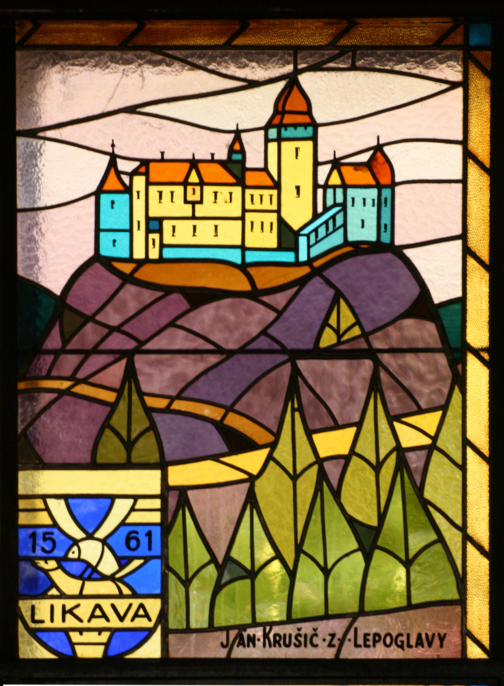 Autorom vitráže v interiéri PKO v Bratislave v roku 1957 bol národný umelec Janko Alexy